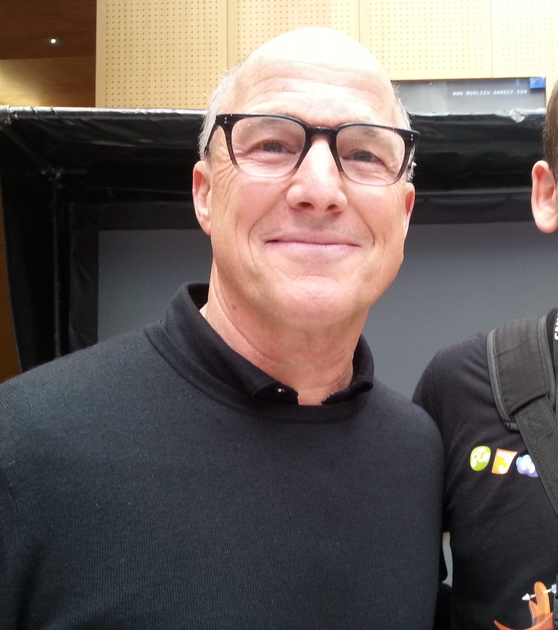 Brad Lewis au festival international du film d'animation d'Annecy 2016